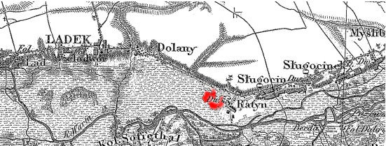 Fragment Mapy królestwa Polskiego tzw. trzywiorstówka z 1839. z zaznaczonym dworem Jaskólskich